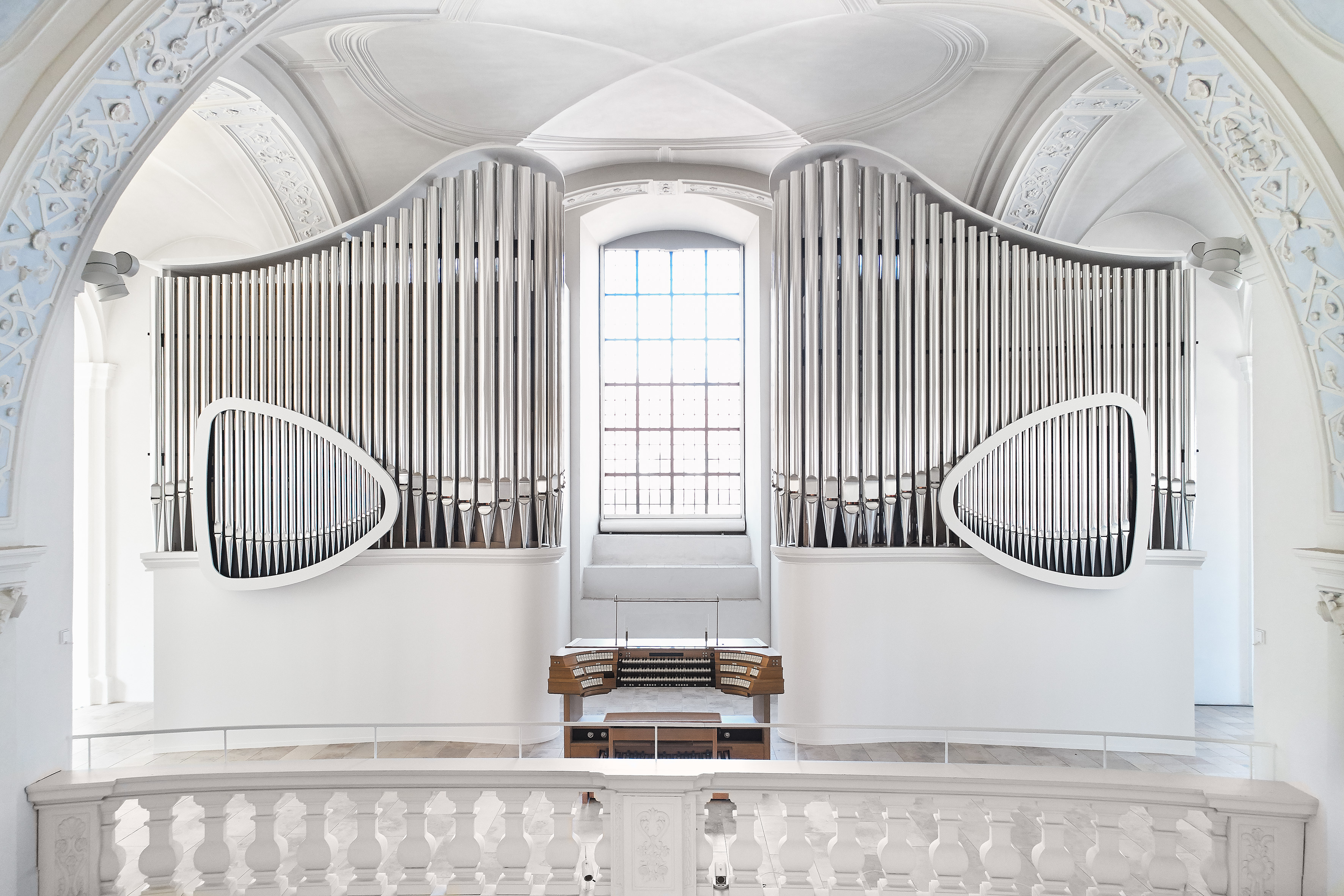 Ansicht aus dem Kirchenraum durch eine Drohne